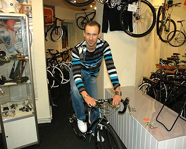 Björn Schröder bei seinem Sponsor Radkom bei Übernahme eines Orbea- Crossrades für Wintertraining